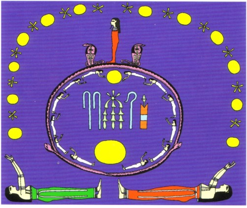 Der nächtliche Sonnenlauf, Abbildung aus der Grabkammer Ramses III., nach Champollion.